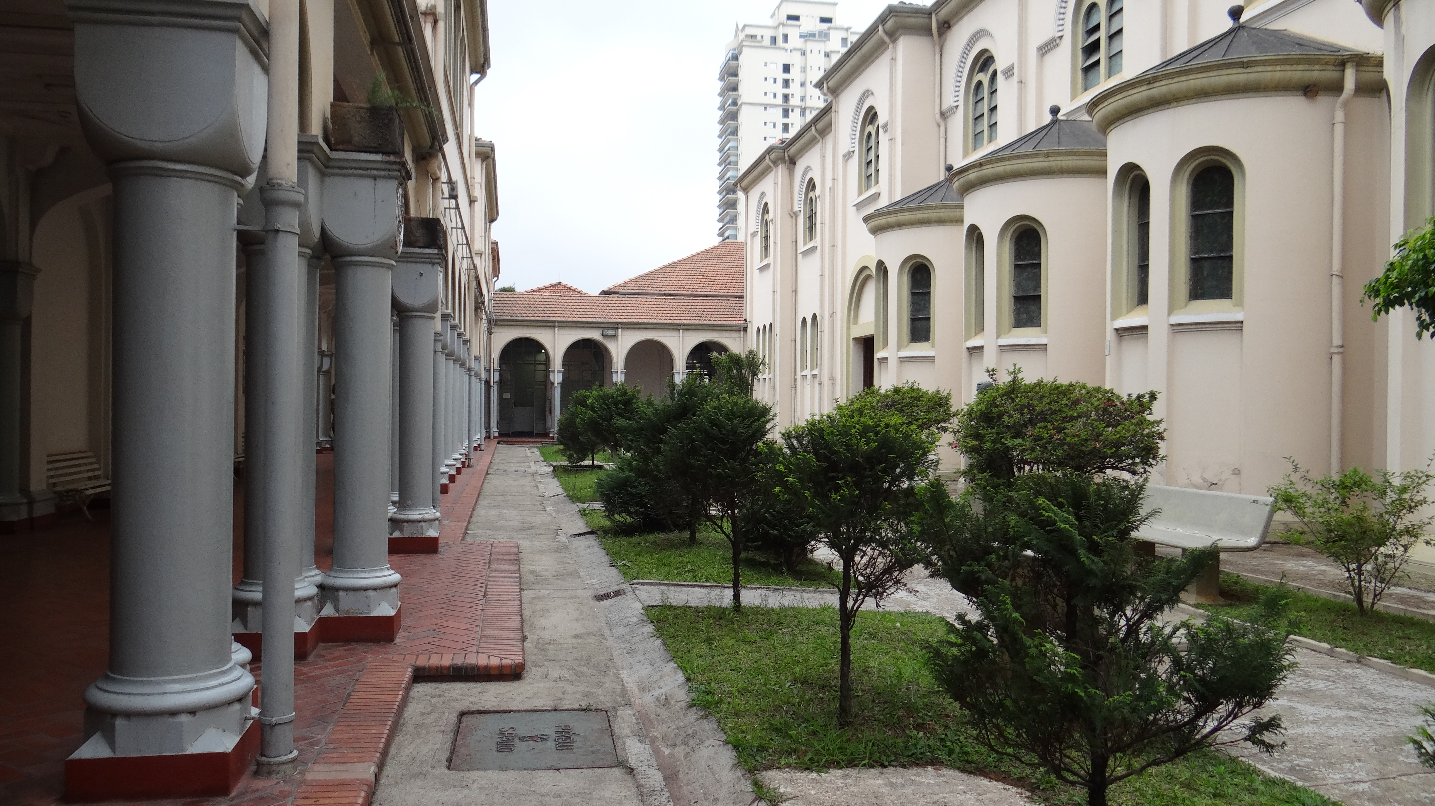 Jardim entre o bloco onde funcionam as salas de aula da PUC-SP e a Paróquia Imaculada Conceição no terreno do antigo Seminário Central do Ipiranga, São Paulo (SP), Brasil.